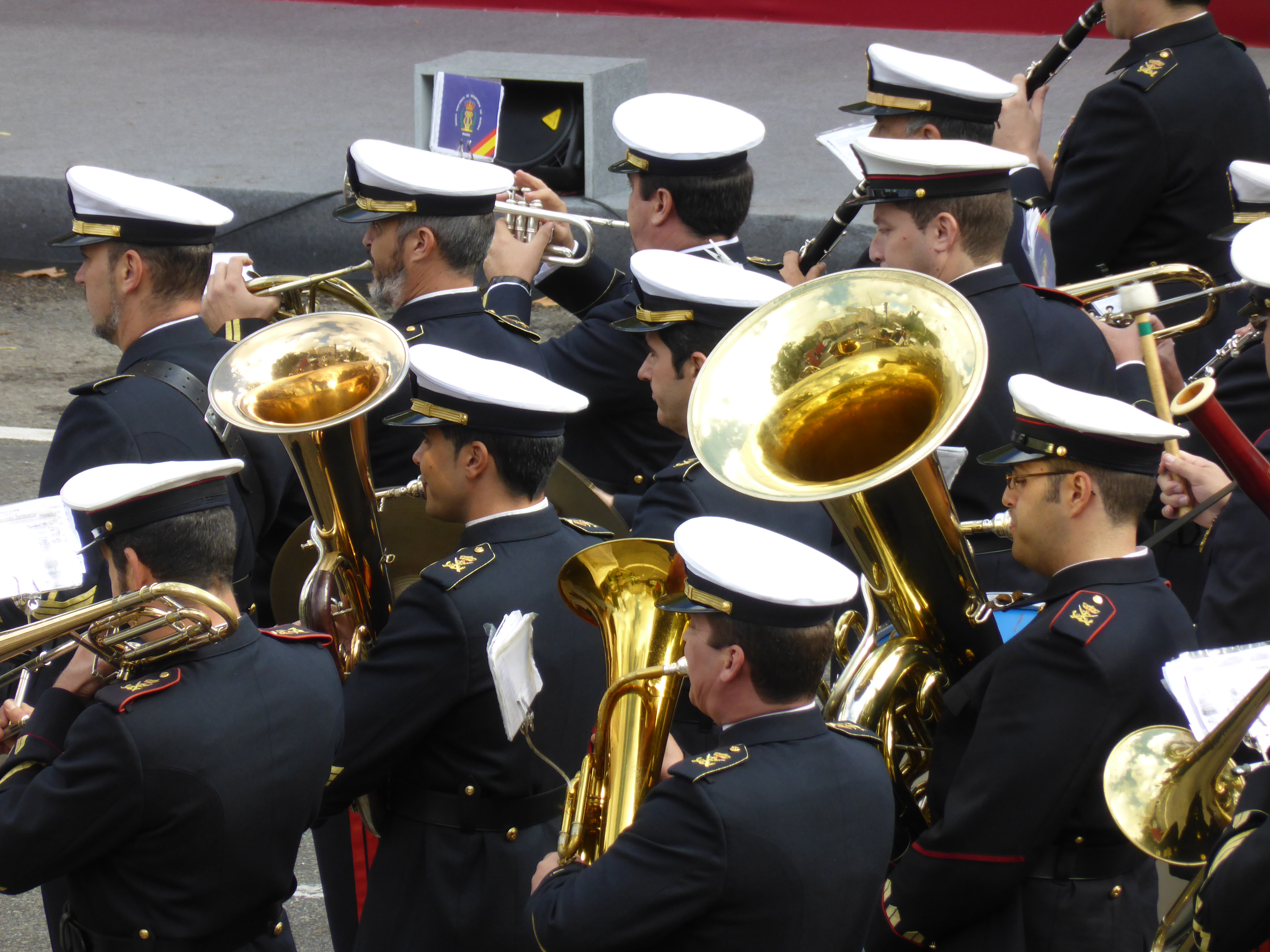 Junto a la Plaza de la Lealtad, el Día de la Fiesta Nacional de España. Concierto de música de la Marina militar.